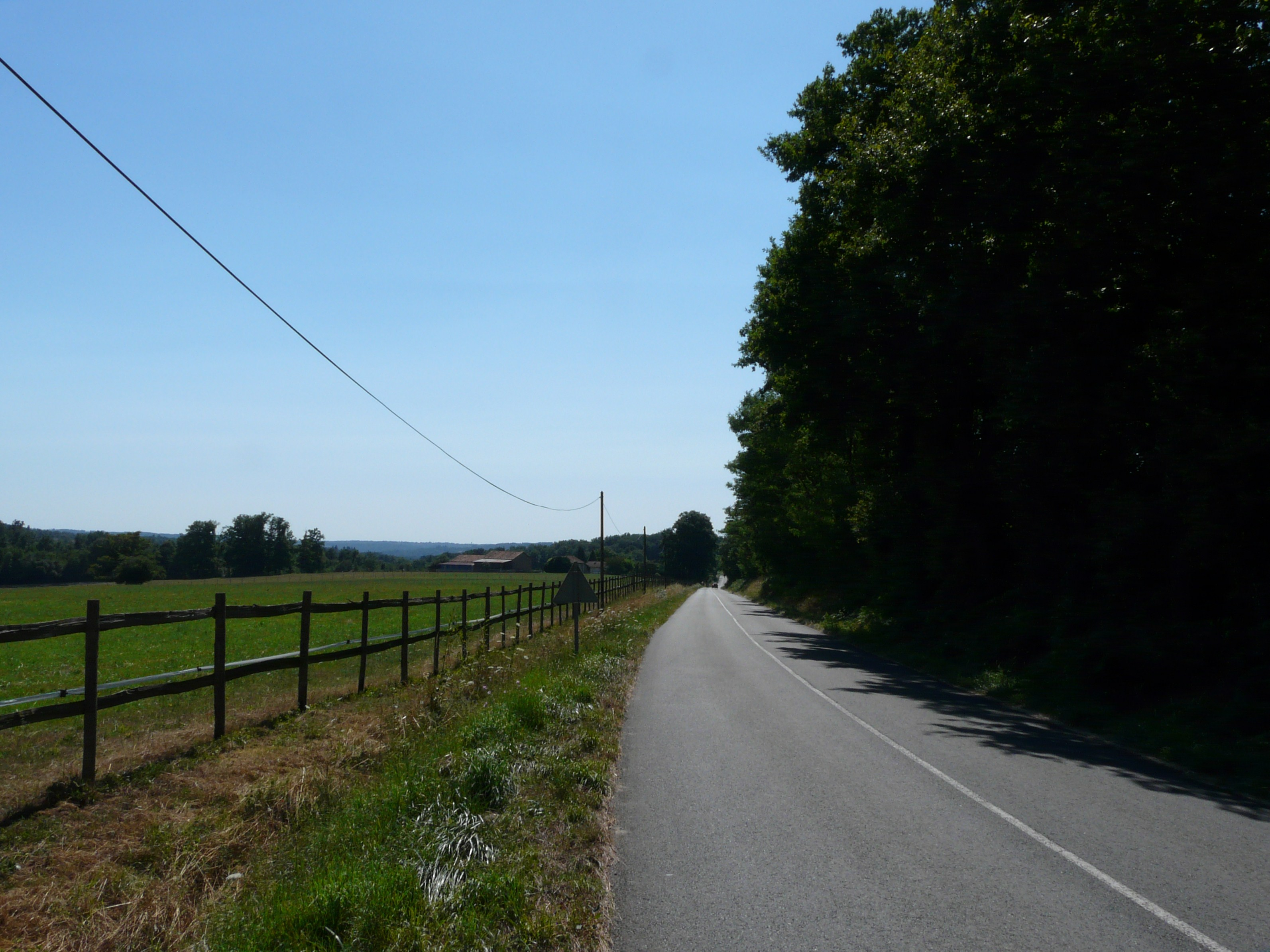 La route départementale 699 au niveau du lieu-dit le Dagois, Busserolles, Dordogne, France.